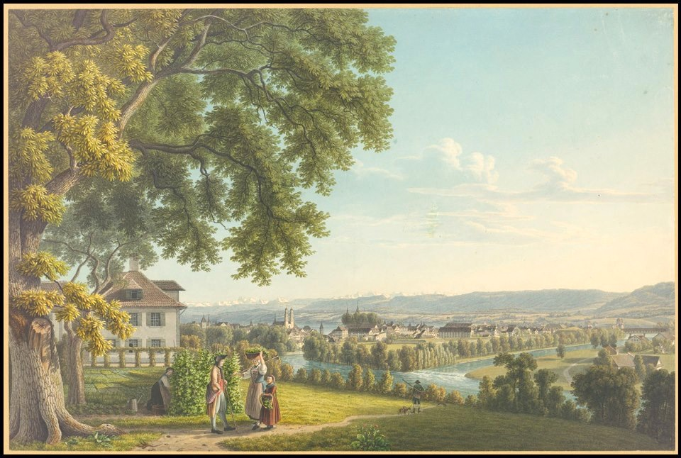 Vue de la ville de Zurich; kolorierte Umrissradierung